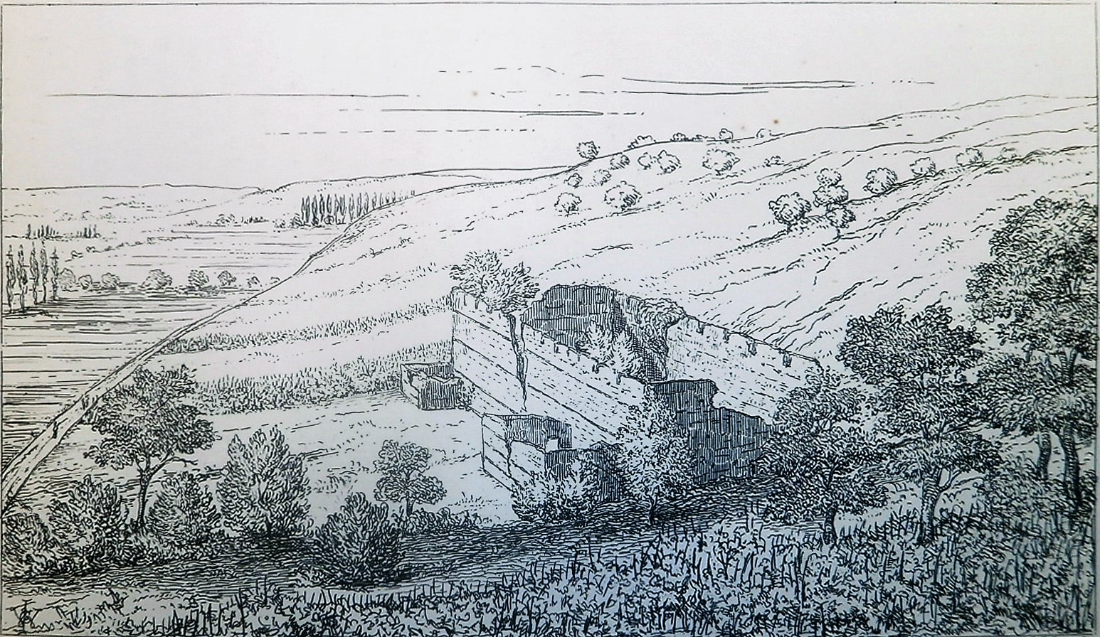 Les ruines des Maselles dessinées par Charles Roach Smith